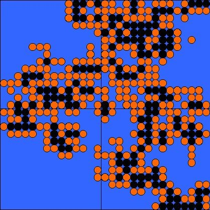 A sketch from a percolation simulation on a simple cubic lattice in three dimensions. Here N=6 and P=1/3. Filled circles denote "colonizing" sites, open circles "non-colonizing" sites, and the absence of circles represents sites not visited. From : Geoffrey A. Landis (NASA Lewis Research Center), « The Fermi Paradox: An Approach Based on Percolation Theory », in Journal of the British Interplanetary Society, London, vol. 51, 1998, p. 165.